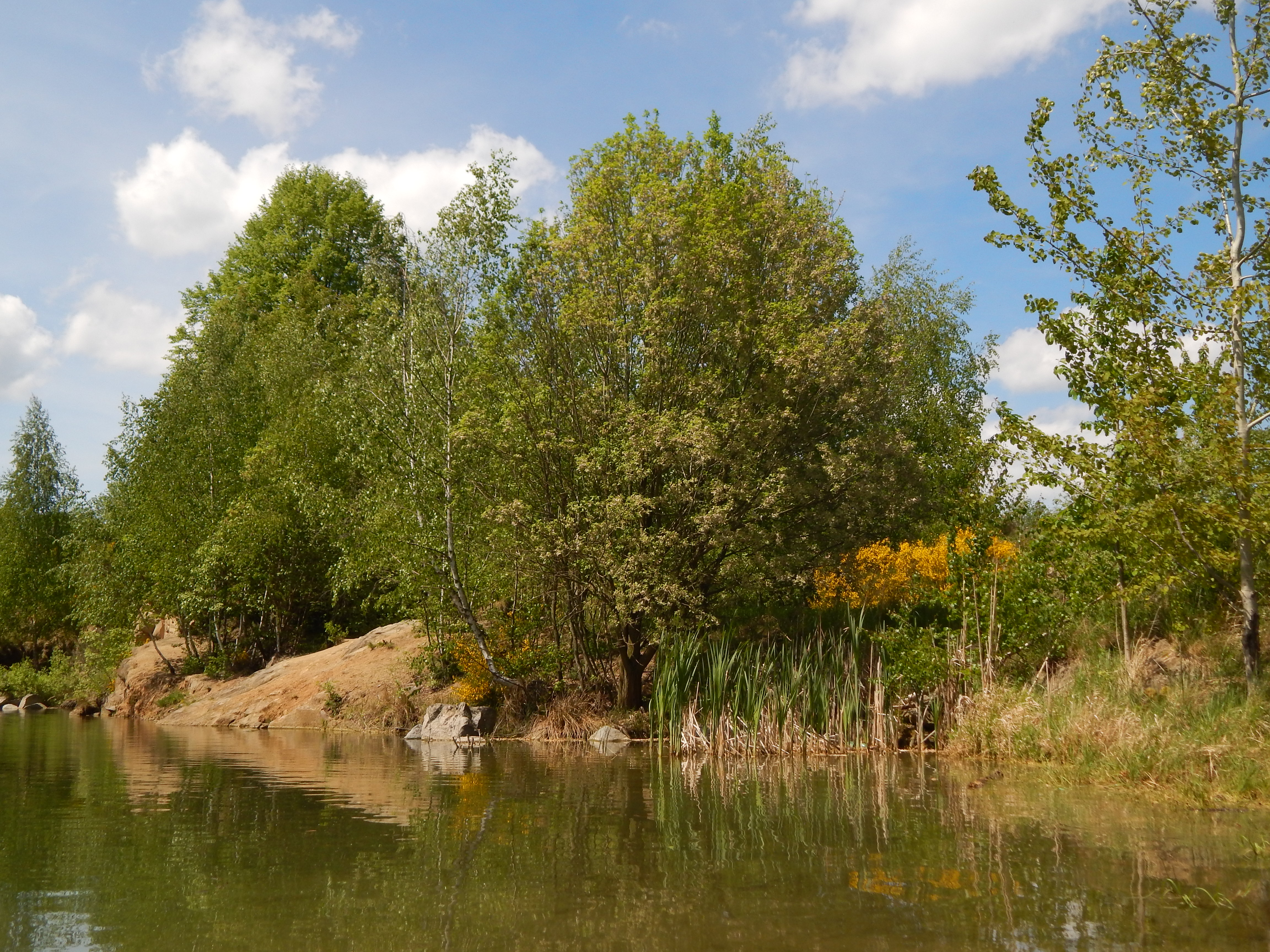 PP Bezděkovský lom